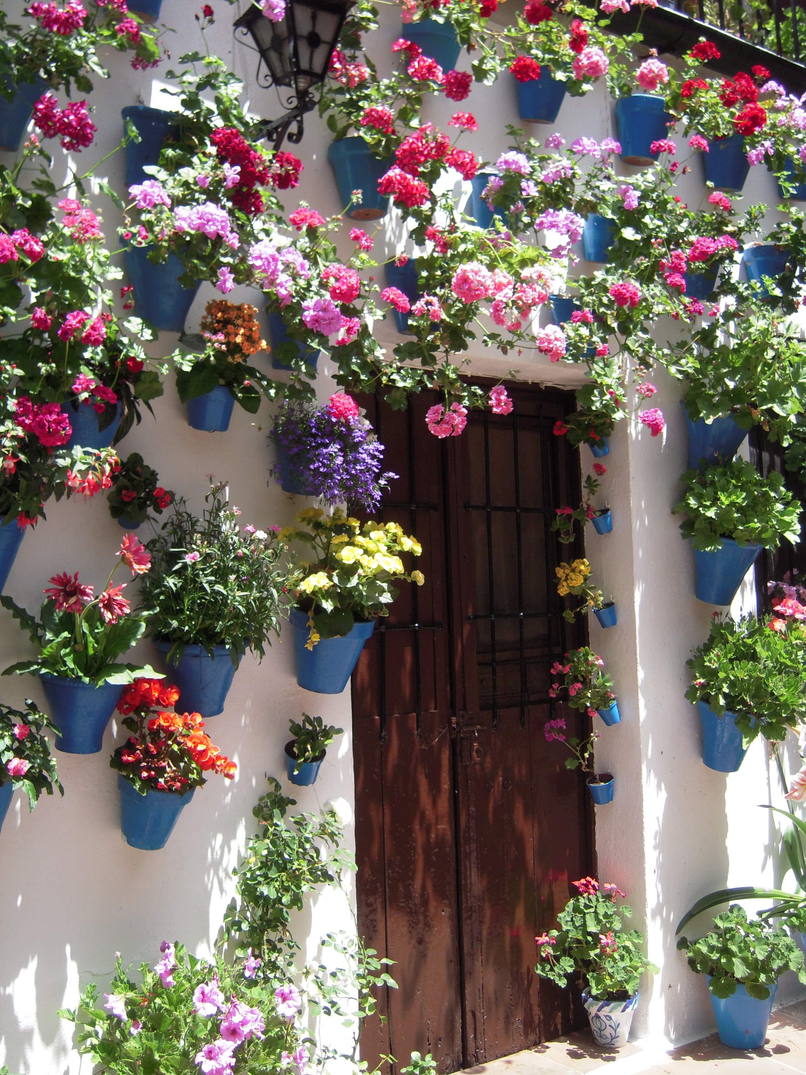 Detalle de un Patio cordobés